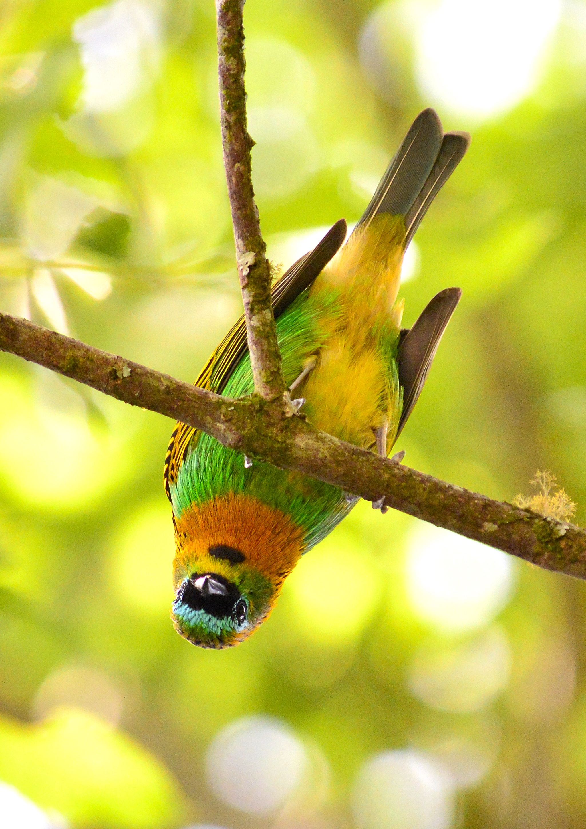 Um curioso saíra-lagarta me observa enquanto faço seu registro. Ave pequena de bando, com cores fabulosas. Alimenta-se frutos e ajuda na dispersão das sementes (ornitocoria), o que o torna importantíssimo no ecossistema.